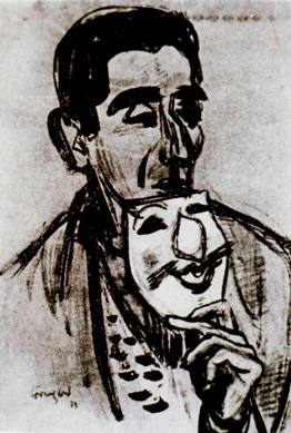 Selbstporträt des Hamburger Malers Kurt Löwengard